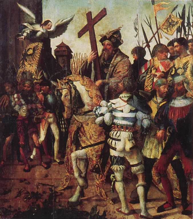 Cristóvão de Figueiredo, Imperador Heraclio com a Santa Cruz ou Exalçamento da Santa Cruz, 1522-1530, 149 x 129,5 cm